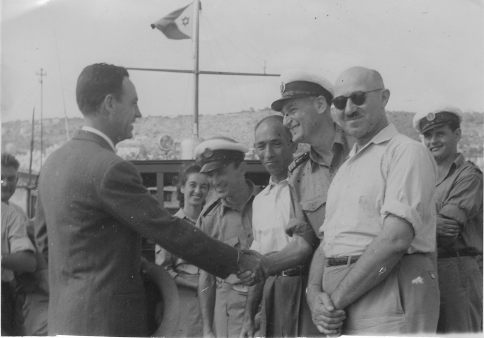 פיקוד חיל הים בנמל חיפה מימין לשמאל דוד הכהן, שמואל ינאי דוד נמרי, שלמה שמיר מאחור מרדכי לימון 1949.